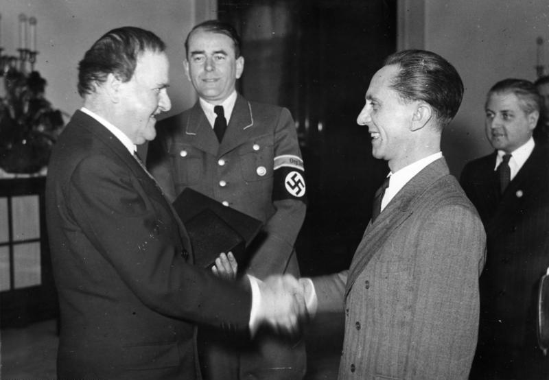 Adlerschild für Professor Kreis.- Übereichung durch Dr. Goebbels. Der Führer verlieh Professor Wilhelm Kreis als einem der größten deutschen Baumeister der Gegenwart zu seinem 70. Geburtstag am 17. März 1943 den Adlerschild des Deutschen Reiches. Reichsminister Dr. Goebbels überreichte in Gegenwart von Reichsminister Speer dem Jubilar die ihm vom Führer verliehene Hohe Auszeichnung und würdigte dabei die Verdienste des Meisters, dessen Schaffen alle Gebiete der Baukunst umfaßt und dem bedeutende baumeisterliche Aufgaben bei der Neugestaltung der Reichshauptstadt und als Generalbaurat für die Gestaltung deutscher Kriegerfriedhöfe bei der Schaffung der deutschen Heldenmäler dieses Krieges übertragen worden sind. Von Reichminister Dr. Goebbels und Reichsminister Speer wurde der Julilar durch Überreichung zweier Kunstwerke besonders geehrt. Orbis